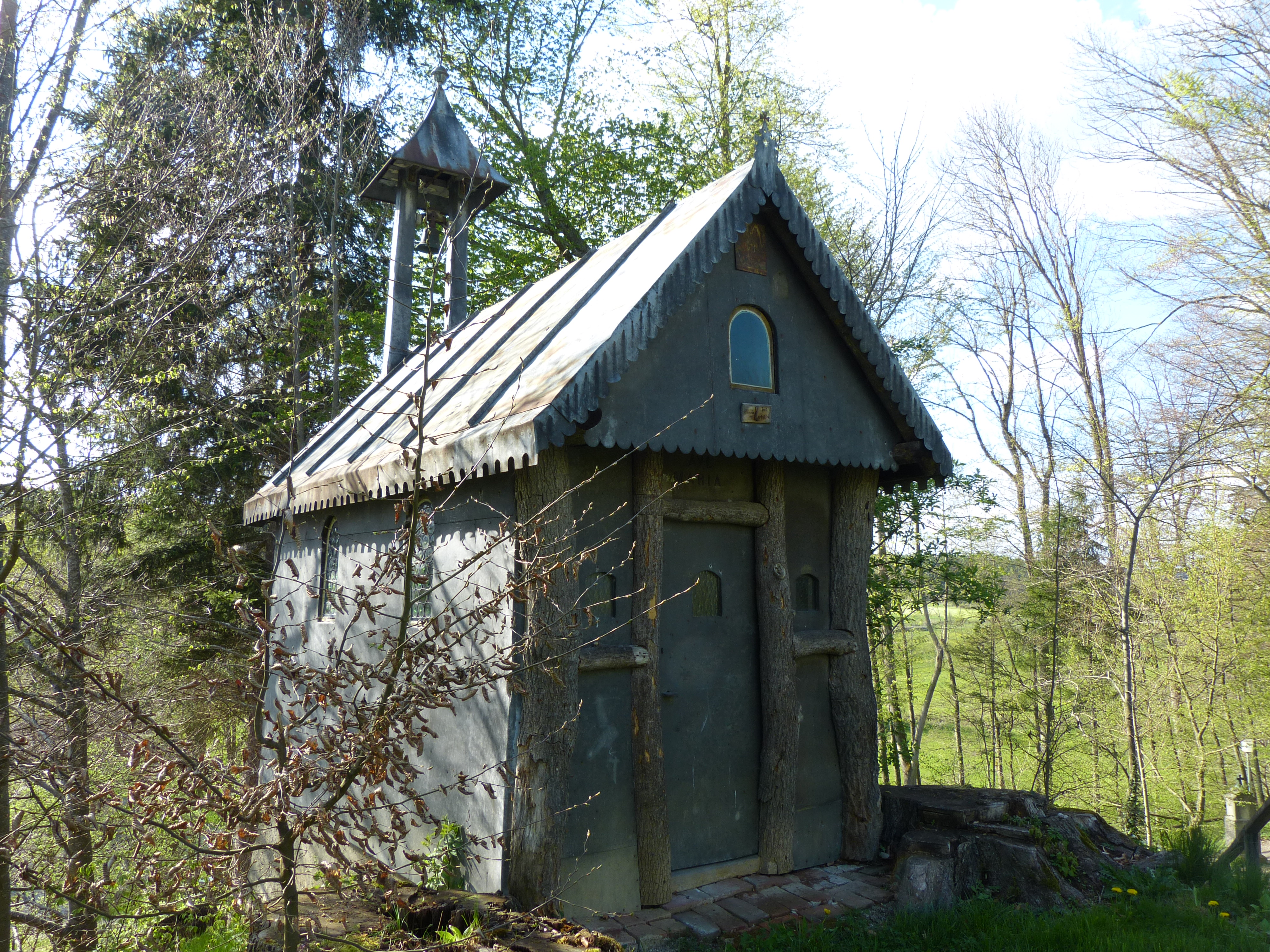 Marienklause im Garten des Pfarrhauses, südlich der Kirche im Ortsteil Könghausen, Eppishausen, Landkreis Unterallgäu, Bayern